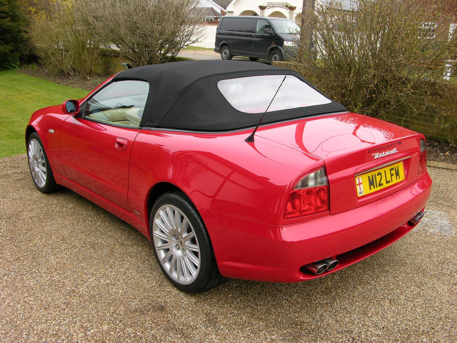 Maserati 4200 Spyder